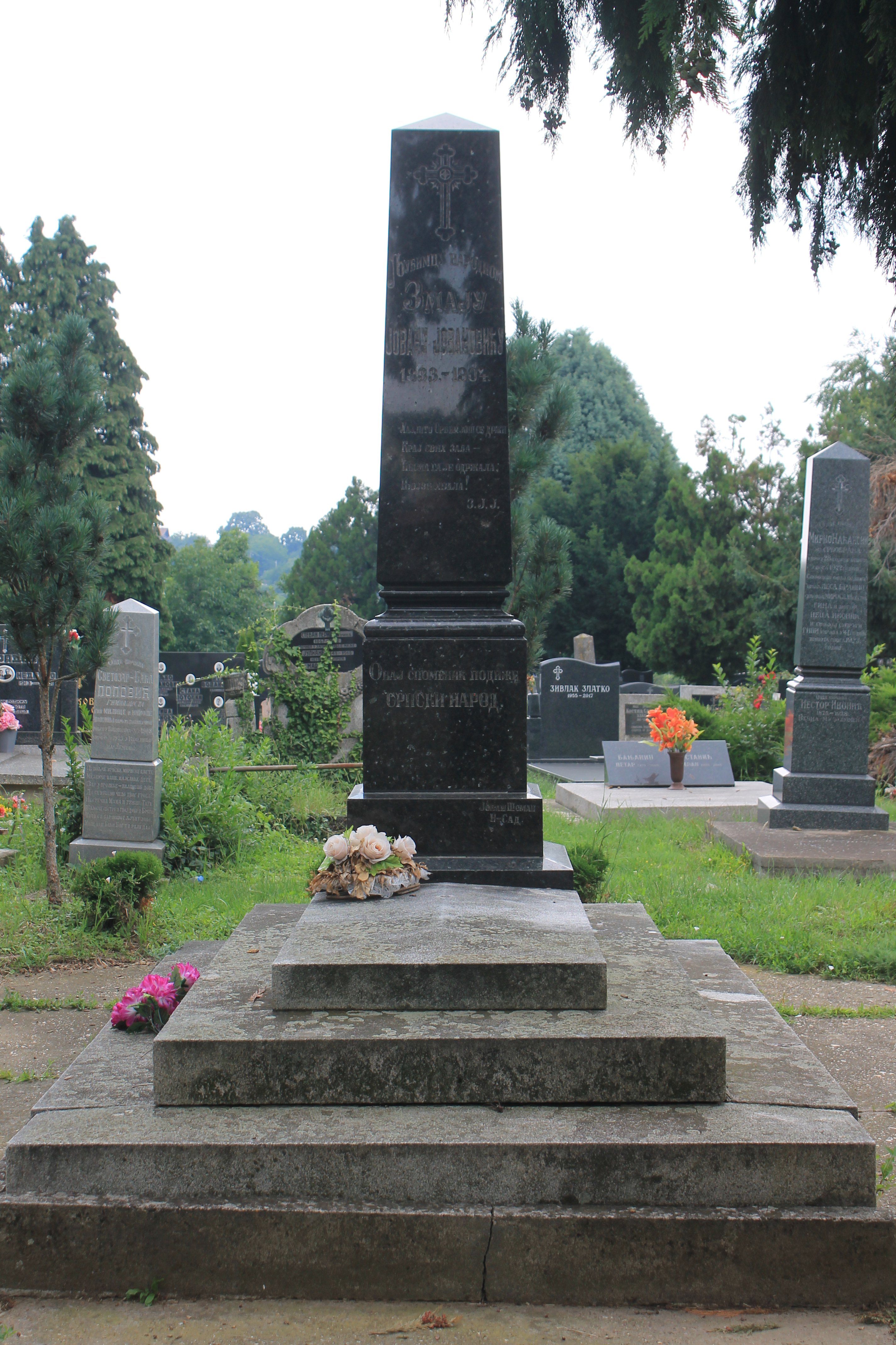 Grob i spomenik Jovana Jovanovića Zmaja, Sremska Kamenica